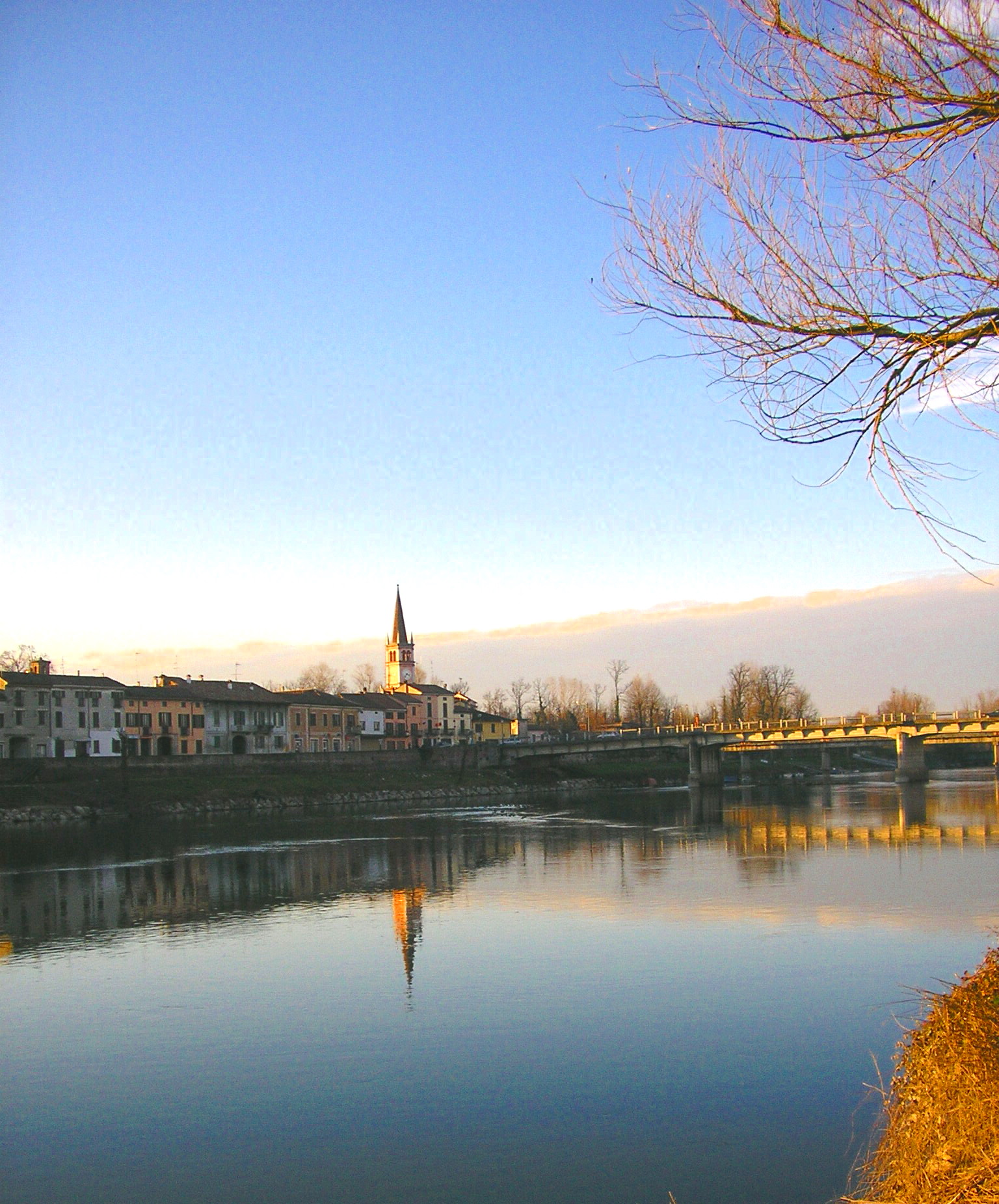 Adda a Pizzighettone